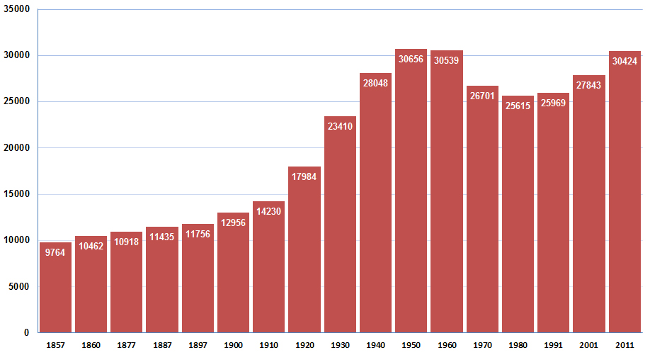 Evolución de la población de Puente Genil (Córdoba-España) desde mediados del siglo XIX